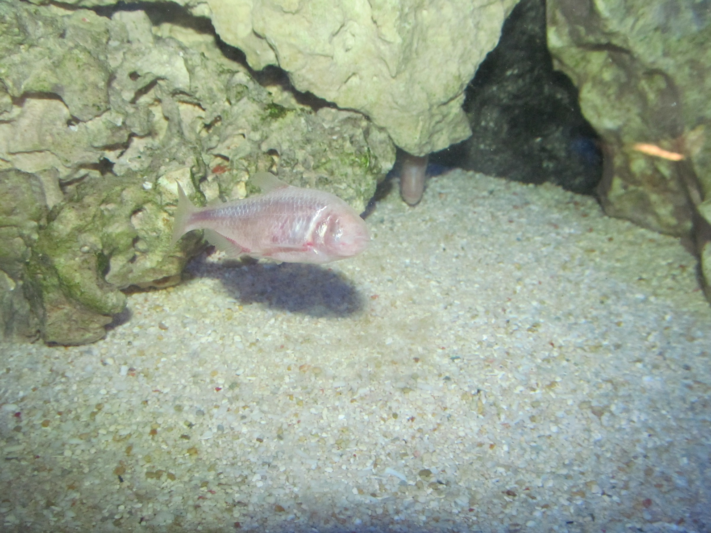 טטרה מקסיקנית עיוורת בגן החיות התנכי